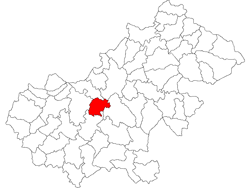 Categorie:Hărţi ale judeţului Satu Mare